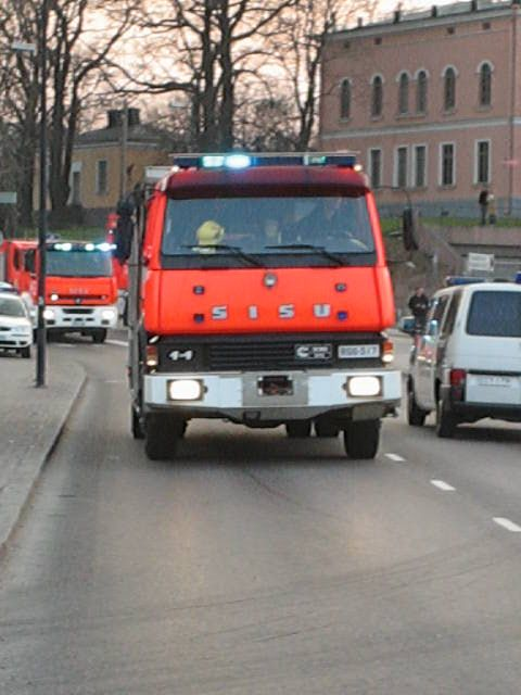 rescue unit Helsinki H15